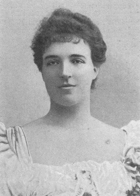 Königin Amelie von Portugal (1865-1951)